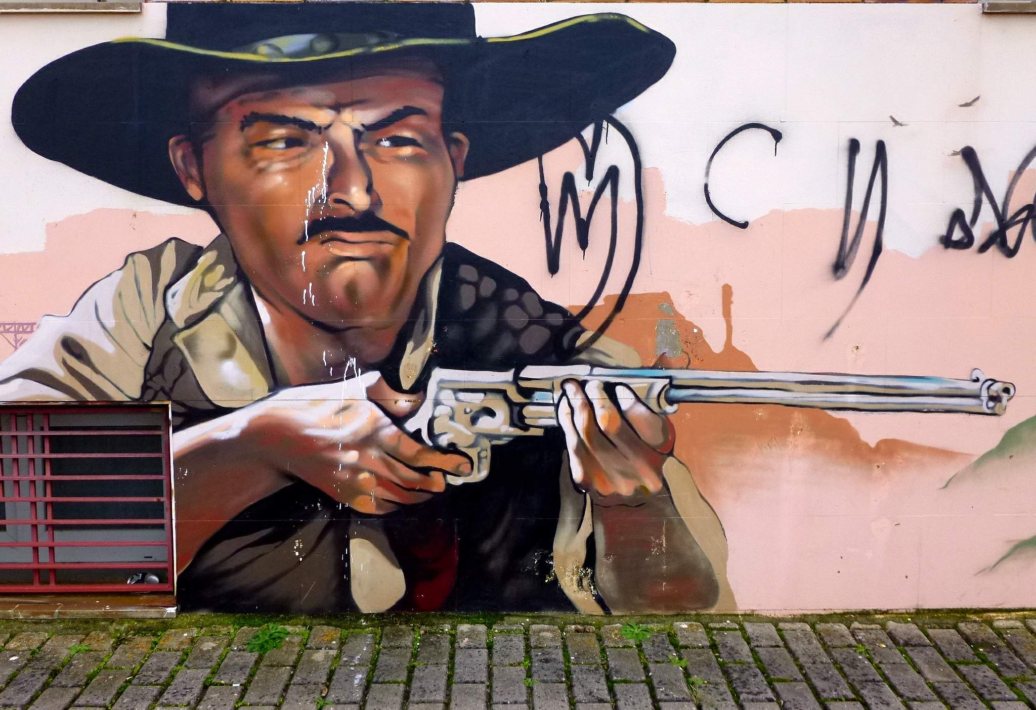 Graffiti en Barañain (Navarra)